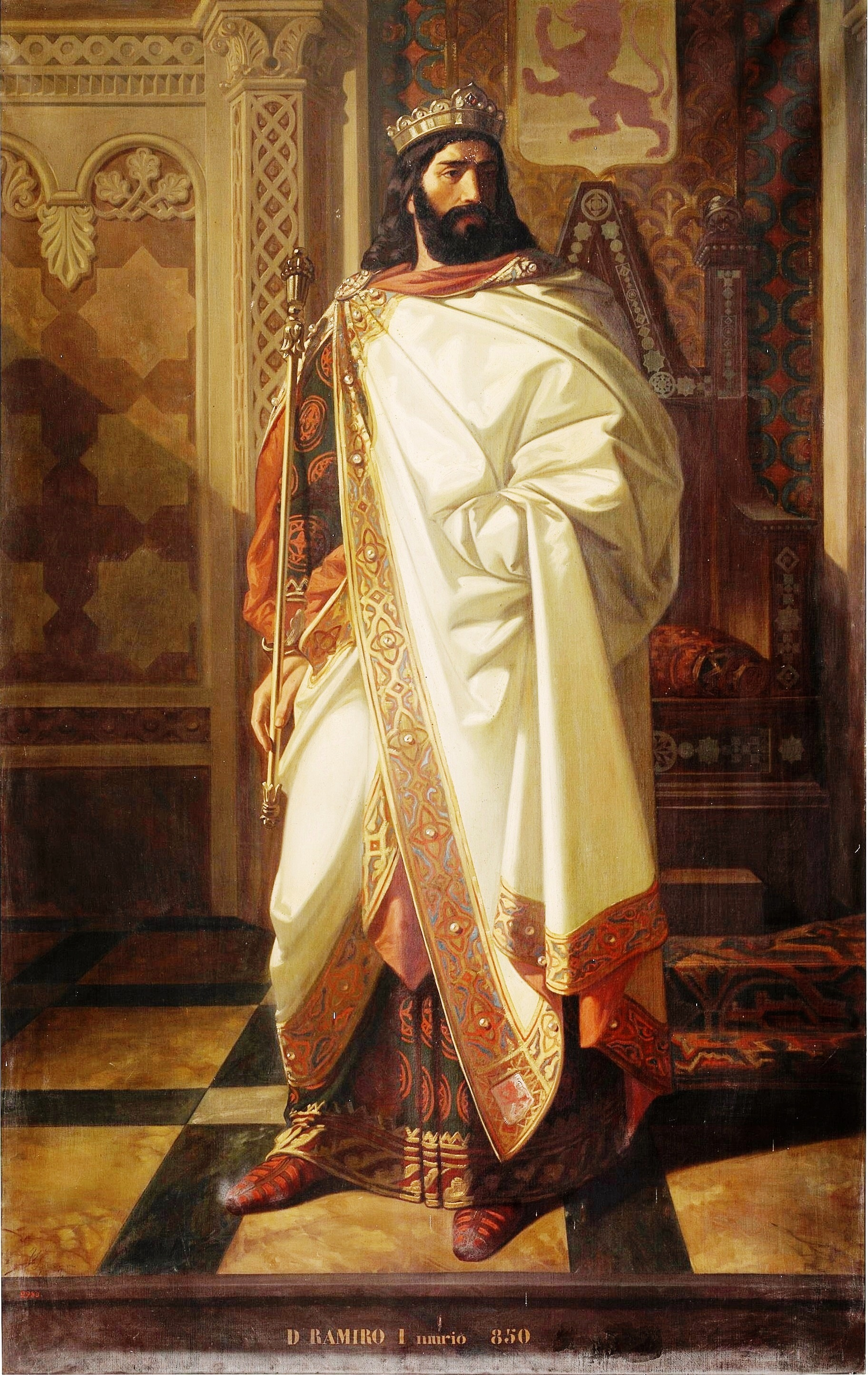 Retrato imaginario del rey Ramiro I de Asturias (c. 790-850), que sucedió en el trono a Alfonso II el Casto y era hijo del rey Bermudo I el Diácono y de la reina Uzenda Nunilona.